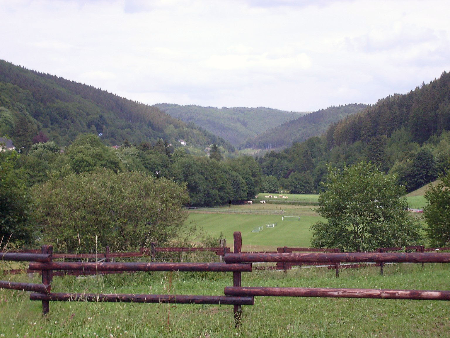 Tal der Erkensruhr Simmerath Eifel Blick von Hirschrot Richtung Erkensruhr